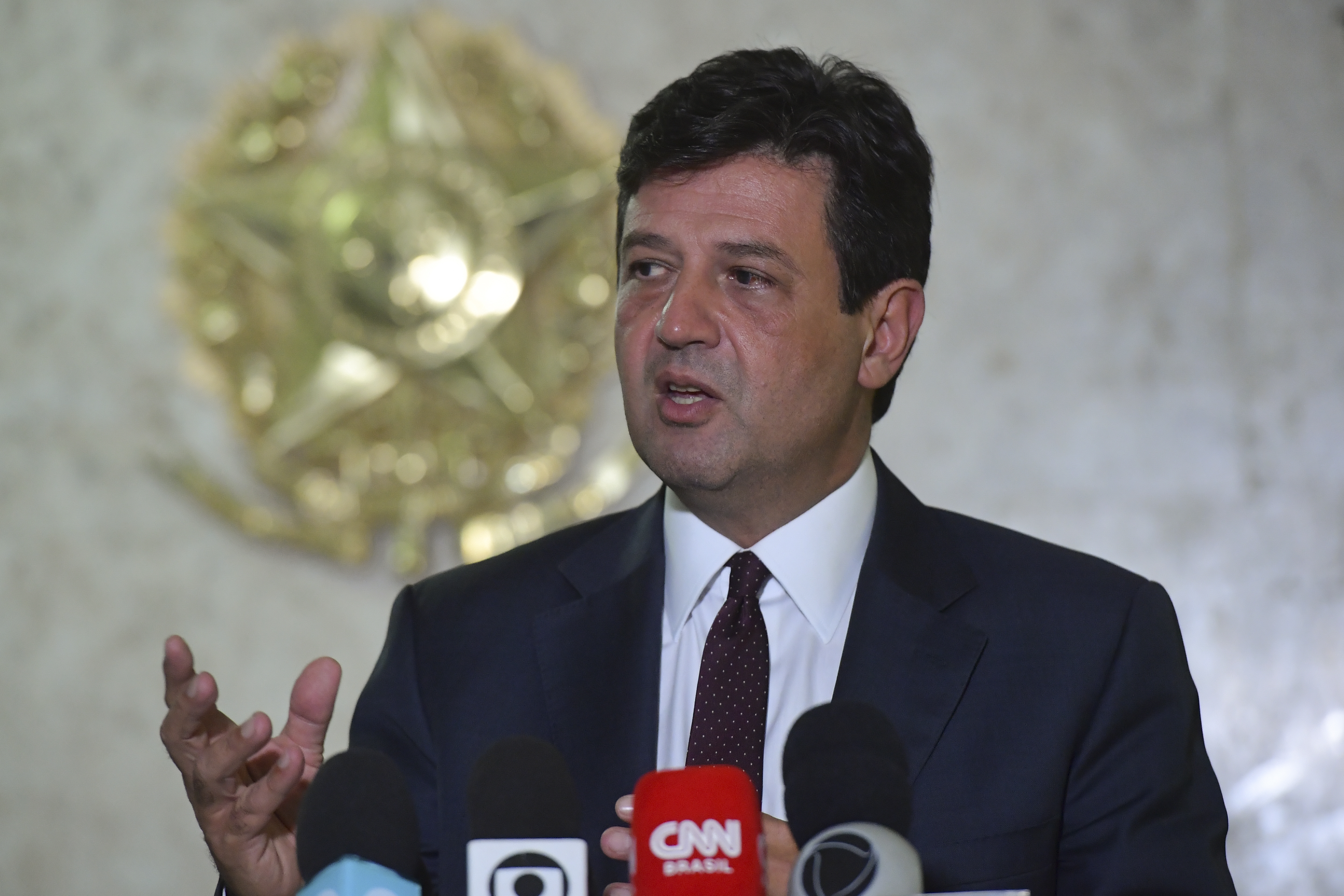 O presidente do Senado, participa de reunião de emergência no Supremo Tribunal Federal (STF), com a presença do ministro da Saúde, Luiz Henrique Mandetta. A reunião foi convocada pelo presidente do Supremo, Dias Toffoli, com o objetivo de debater ações de enfrentamento à covid-19, doença causada pelo novo coronavírus. O Brasil já tem mais de 230 casos confirmados. Mandetta apresentou às autoridades presentes um balanço da disseminação do vírus pelo país e das ações já iniciadas por sua pasta e pelo governo federal. Ministro da Saúde, Luiz Henrique Mandetta, concede entrevista. Foto: Marcos Brandão/Senado Federal